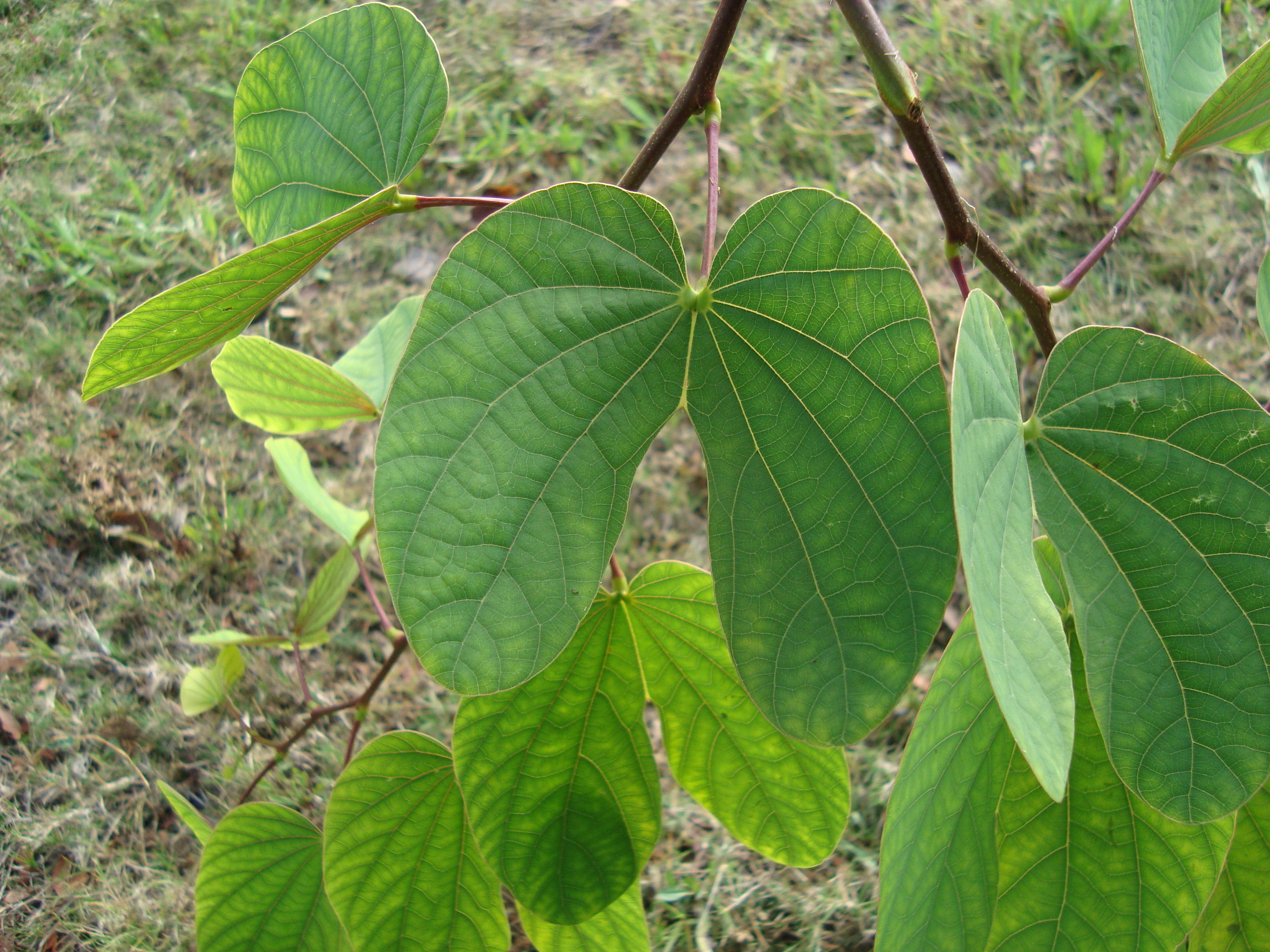 Bauhinia aus Teneriffa